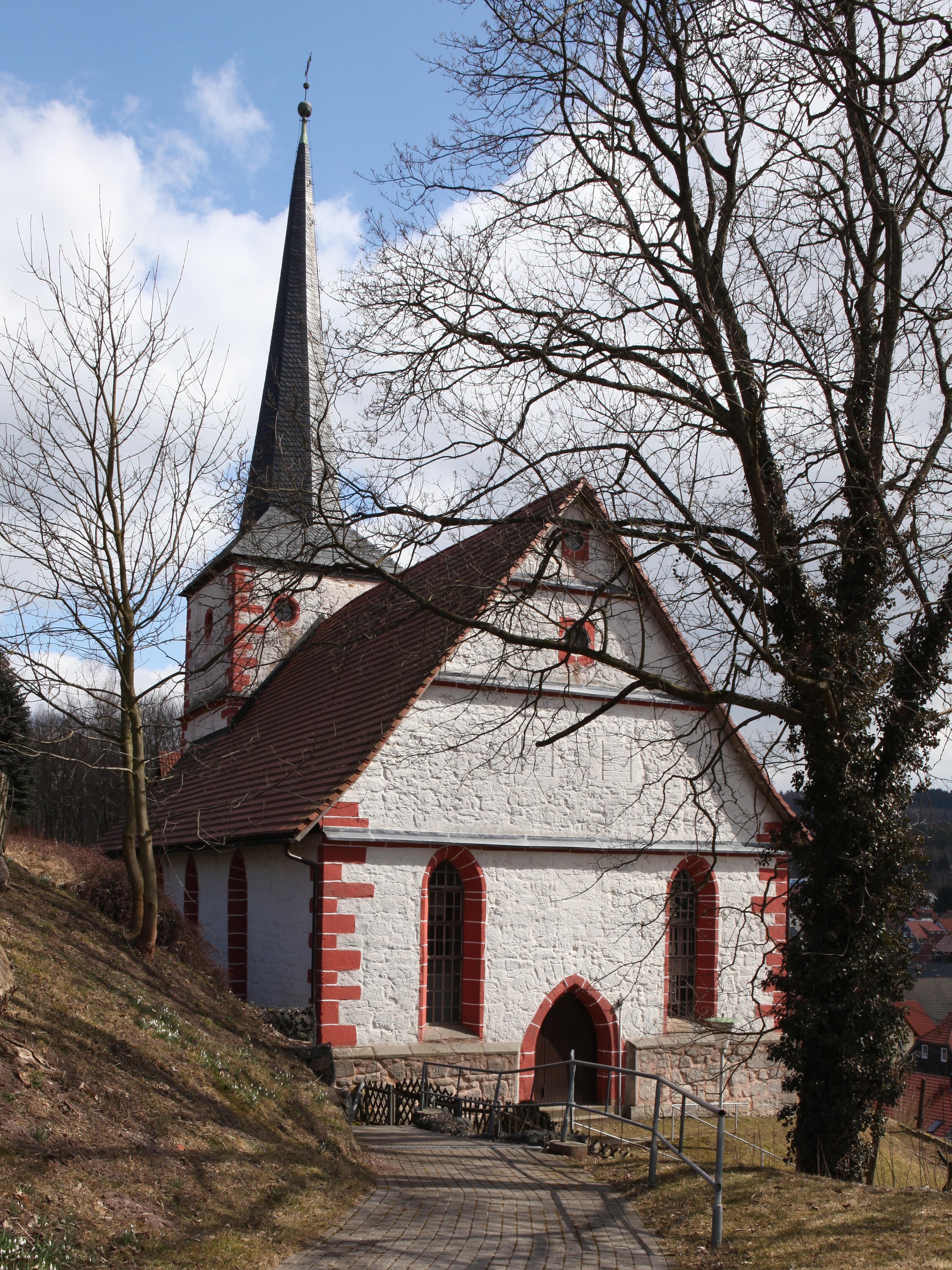 Evangelisch-Lutherische Kirche in Hinternah, OT von Nahetal-Waldau, Landkreis Hildburghausen